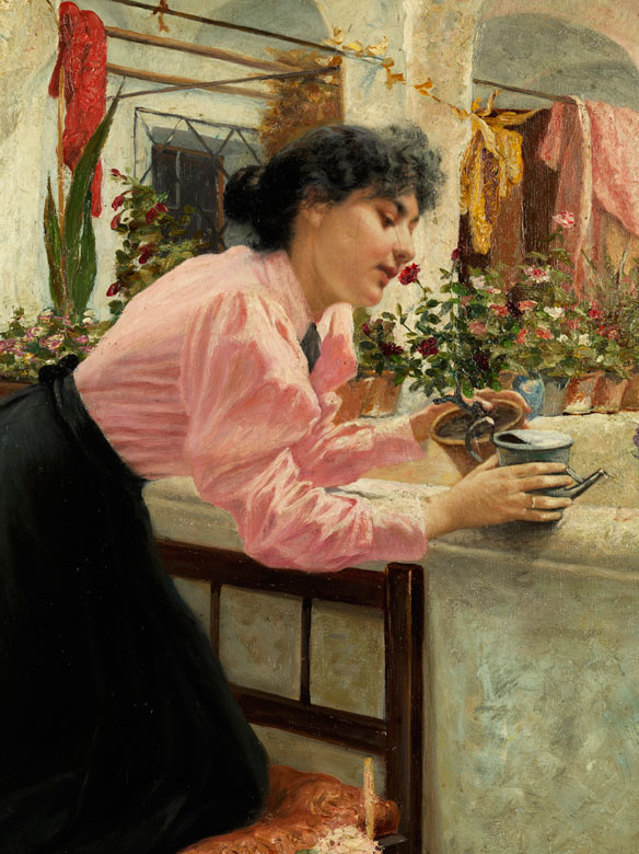 Junge Frau beim Blumengießen in einer Hofarkade. Öl auf Leinwand. 65 x 56 cm. Rechts unten signiert und 1896 datiert.